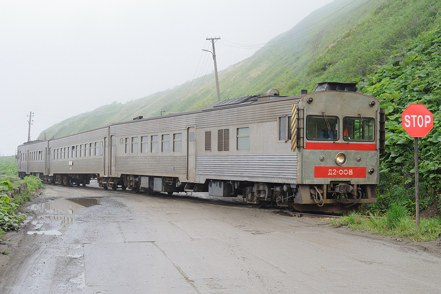 Д2 in Poljakowo